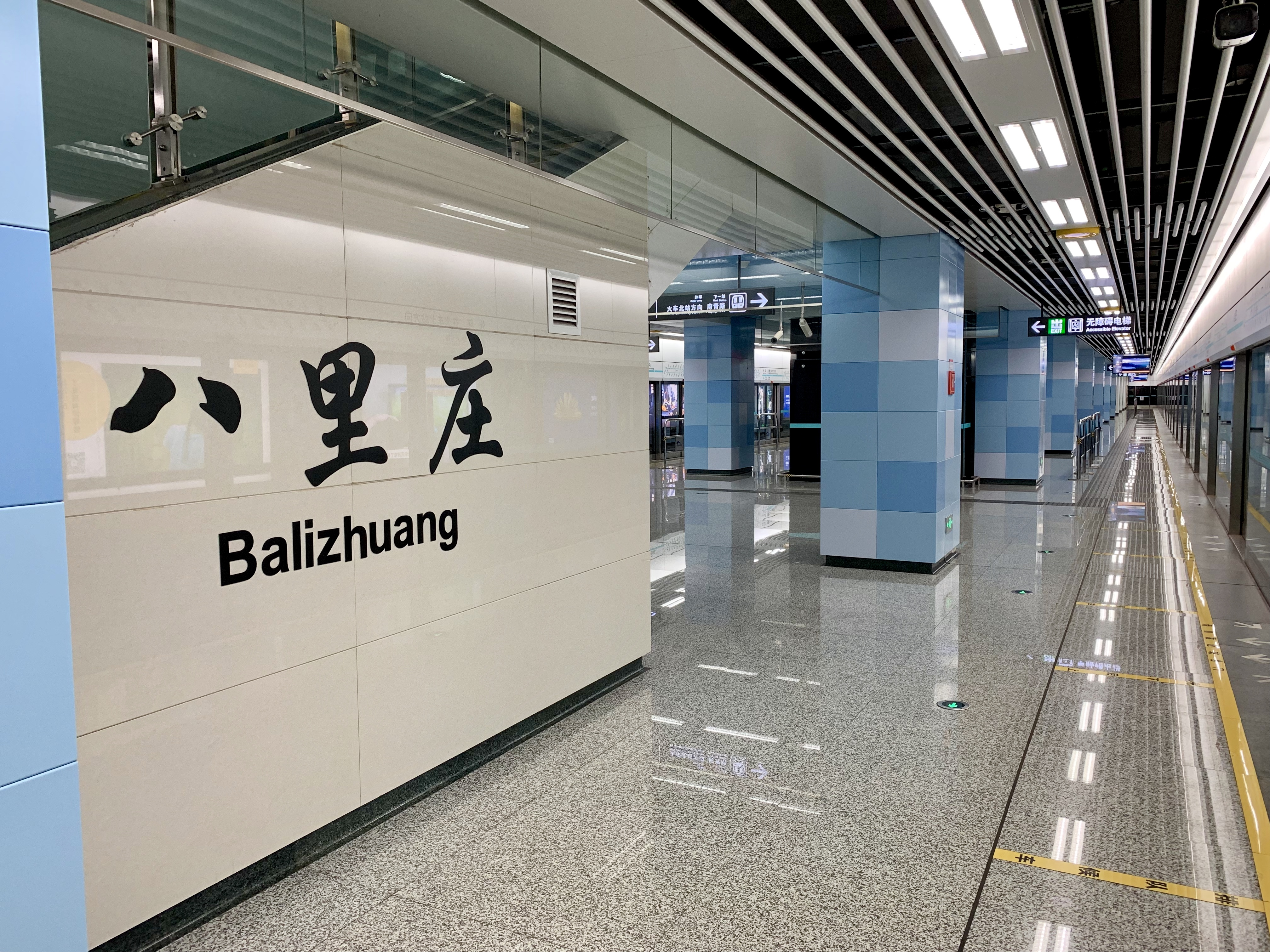 成都地铁7号线八里庄站